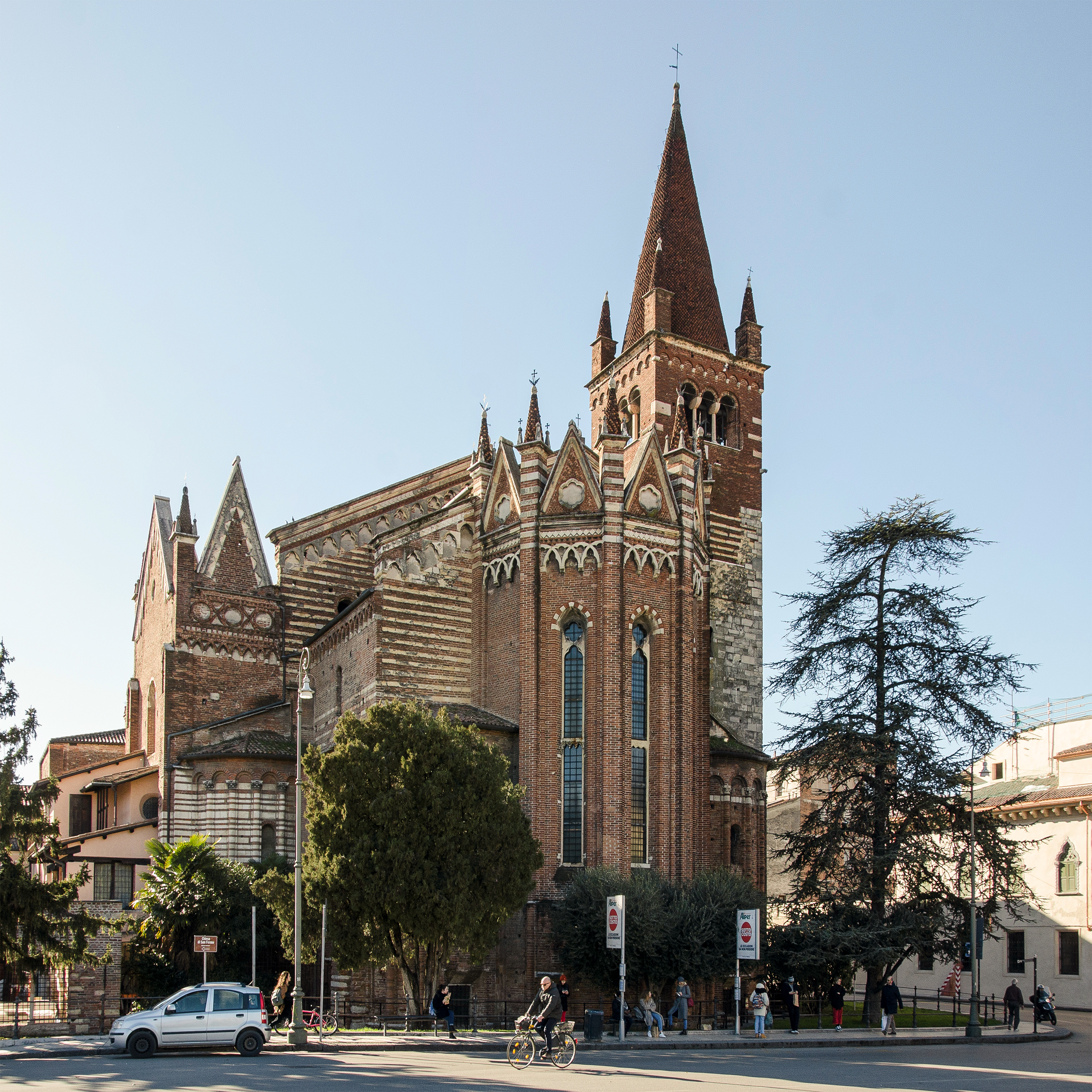 Fotografia dell'esterno